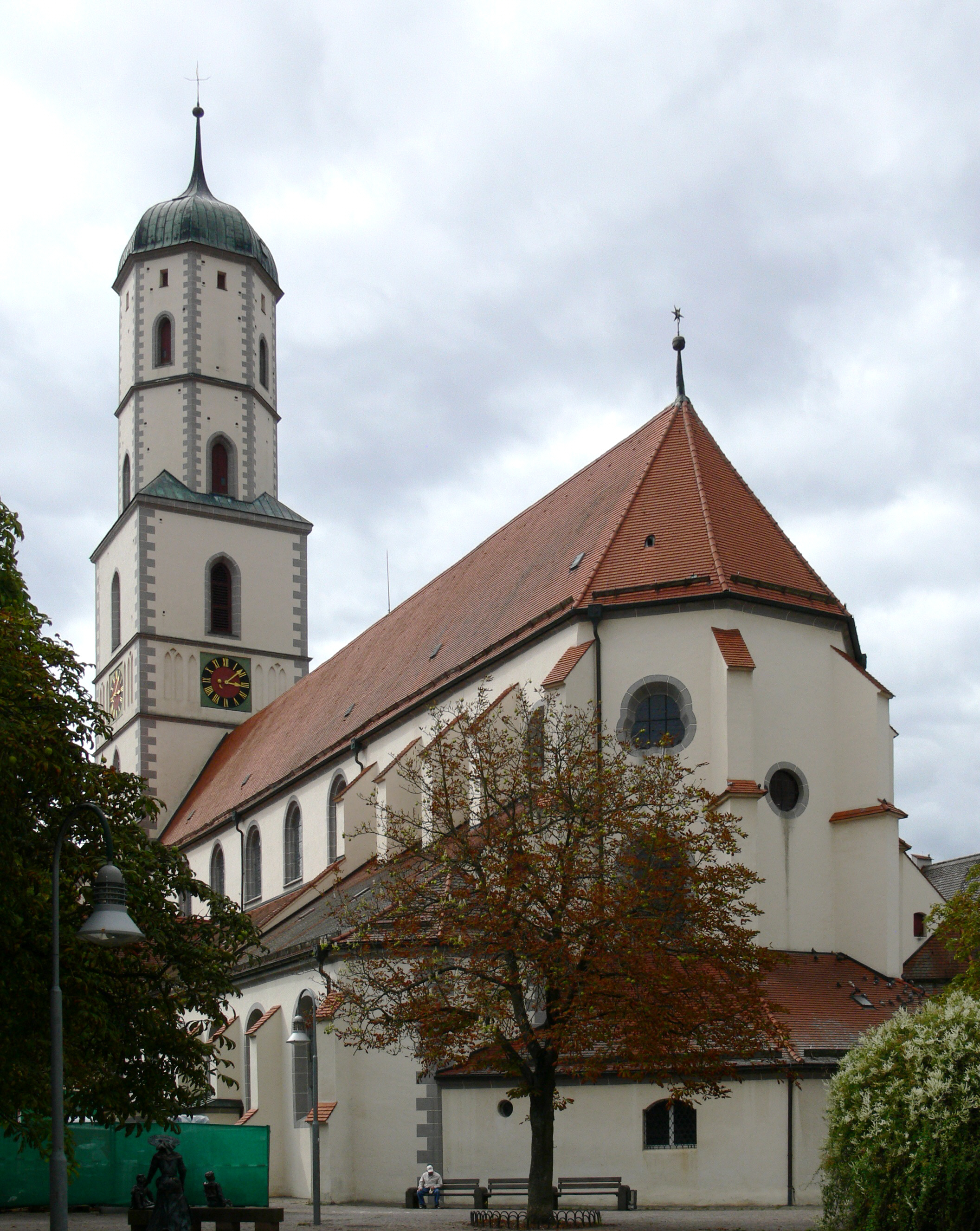 Biberach an der Riß Stadtpfarrkirche St. Martin